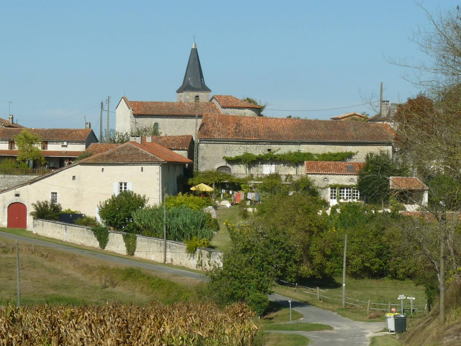 vue de Courlac (16), France